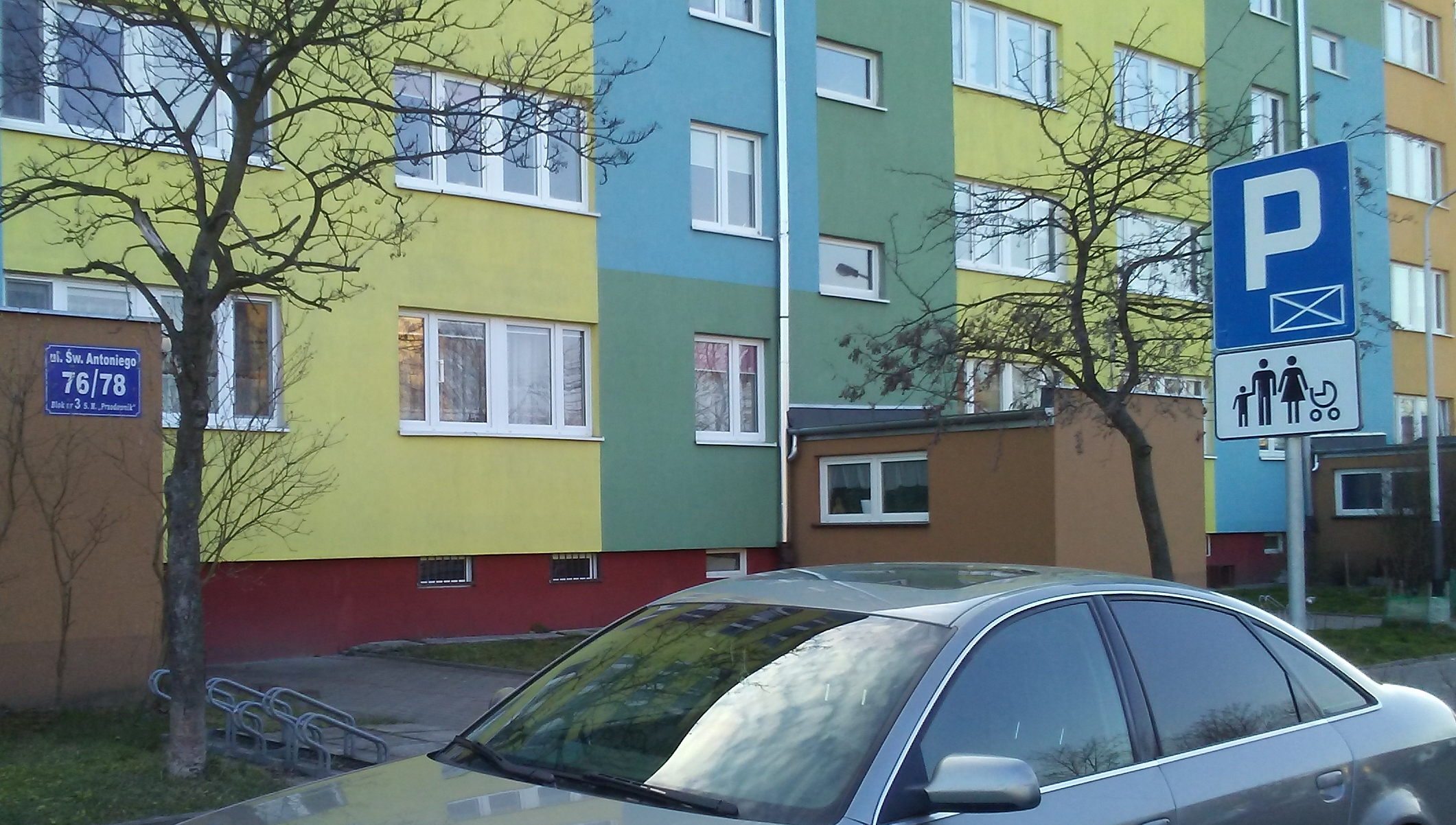 Miejsce parkingowe dla rodzin z dziećmi na osiedlu Hubala I zarządzanym przez SM „Przodownik” w Tomaszowie Mazowieckim, w województwie łódzkim